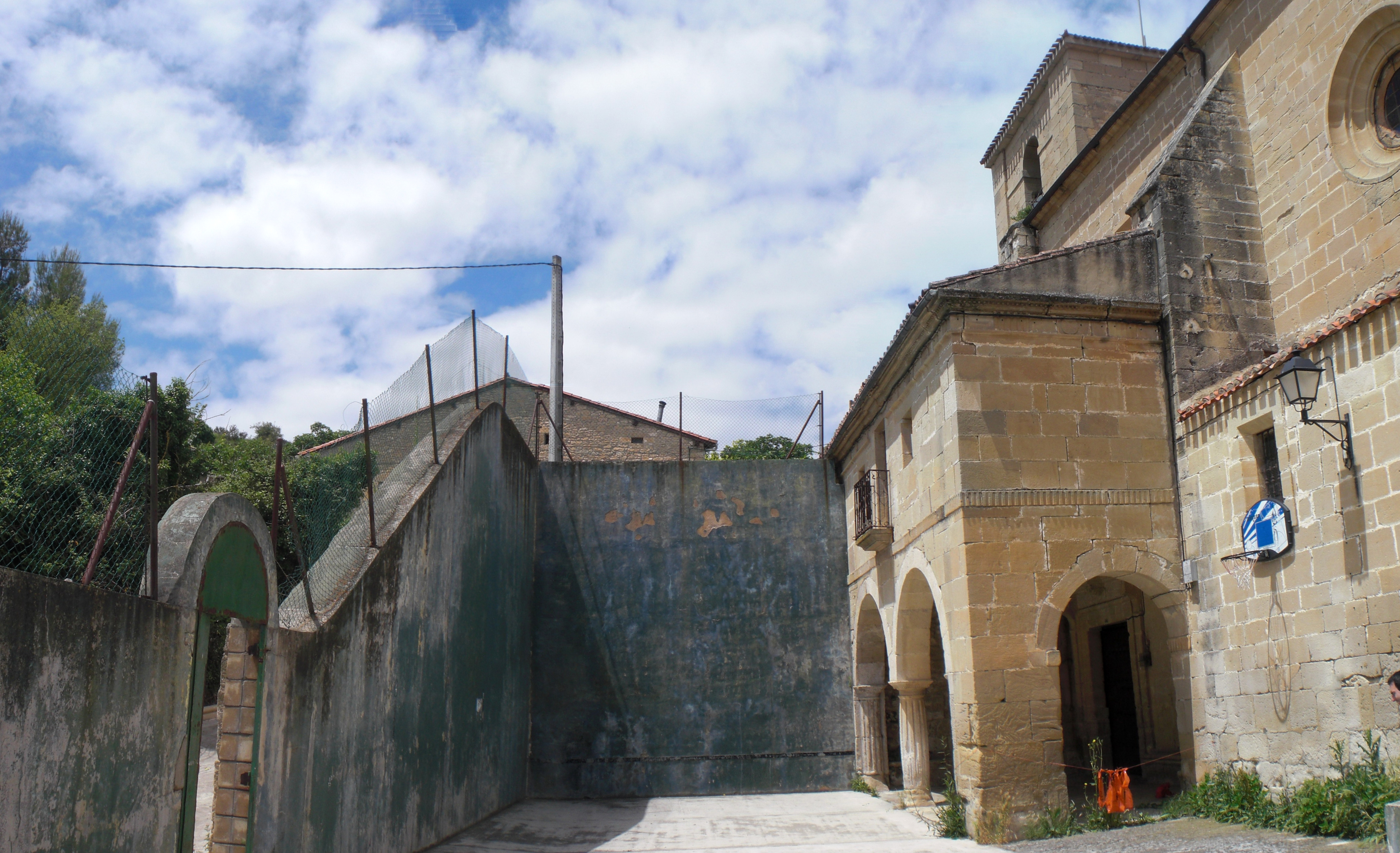 Mijancasko eliza eta frontoia